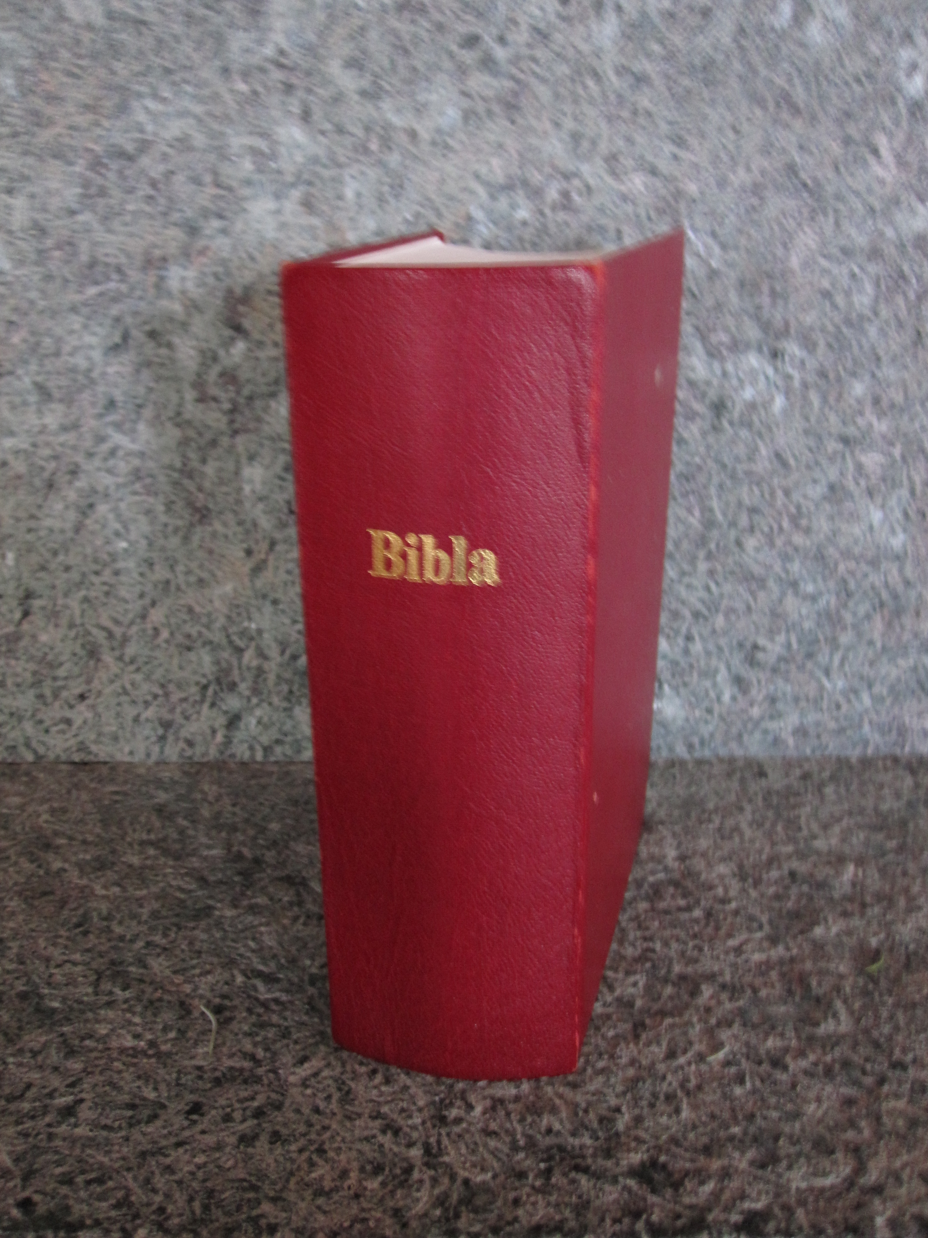 die Engadinerbibel, die Soncha Scrittüra